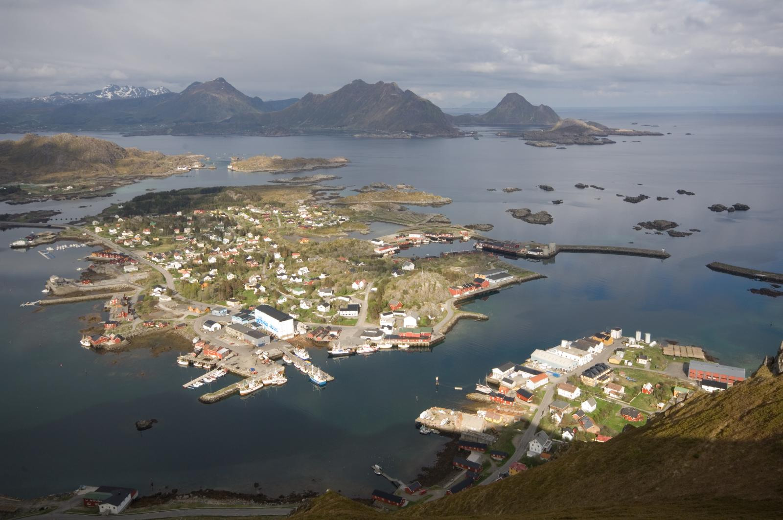 Ballstad i Vestvågøy